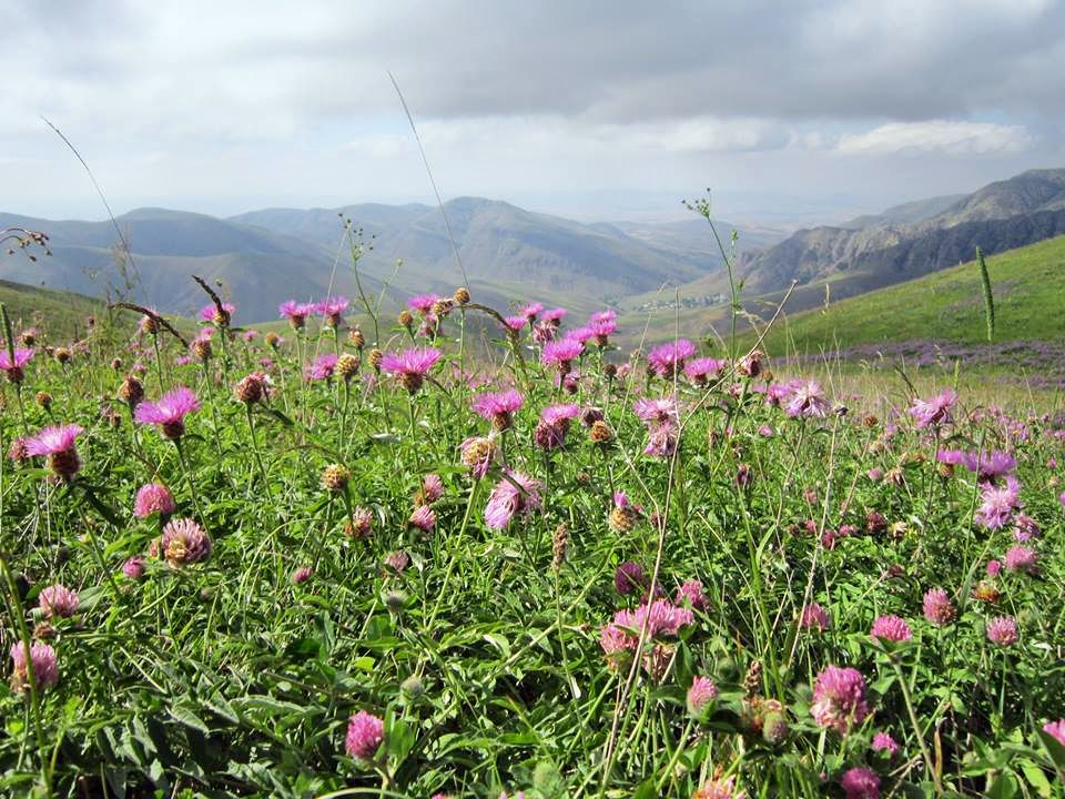 گياهان دارويي كمياب در آرپاچوخوري خان كندي گرمي